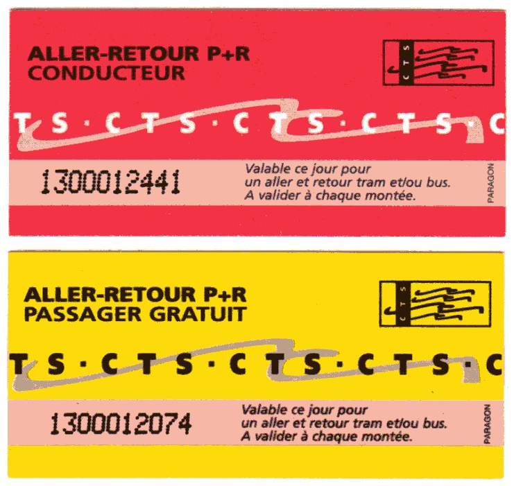 Tickets P+R de la la Compagnie des transports strasbourgeois (CTS)